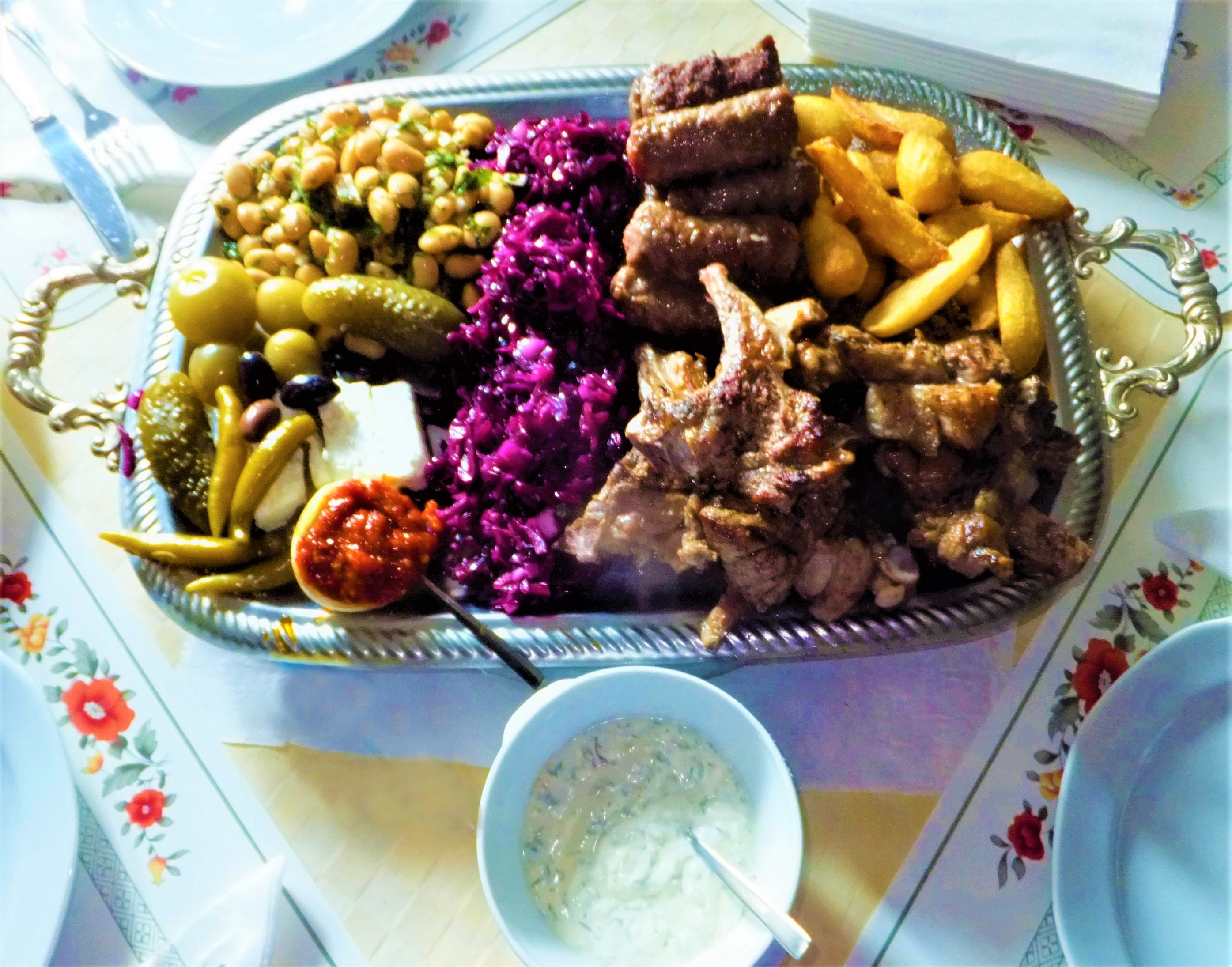 Rumänischer Mixed Grill mit Mititei, Schweinspieße, Rind und Lammkoteletts sowie Weiße-Bohnen- , Blaukrautsalat, Eigelegtes, Schafskäse Peperoni- und Joghurtcreme , Pommes